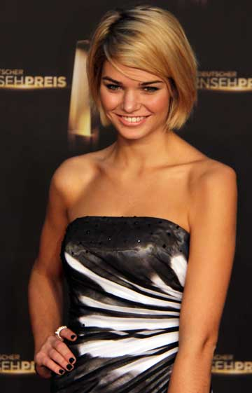 Luisa Hartema beim Deutschen Fernsehpreis 2012